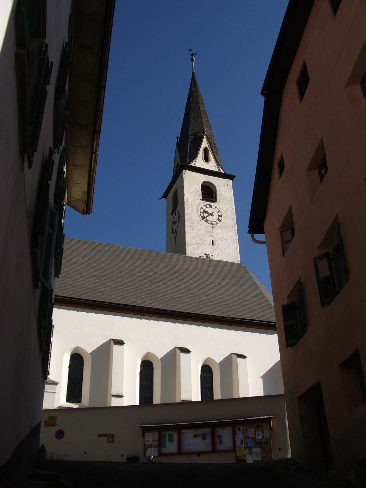 Ardez GR, Switzerland self-made, September 2006